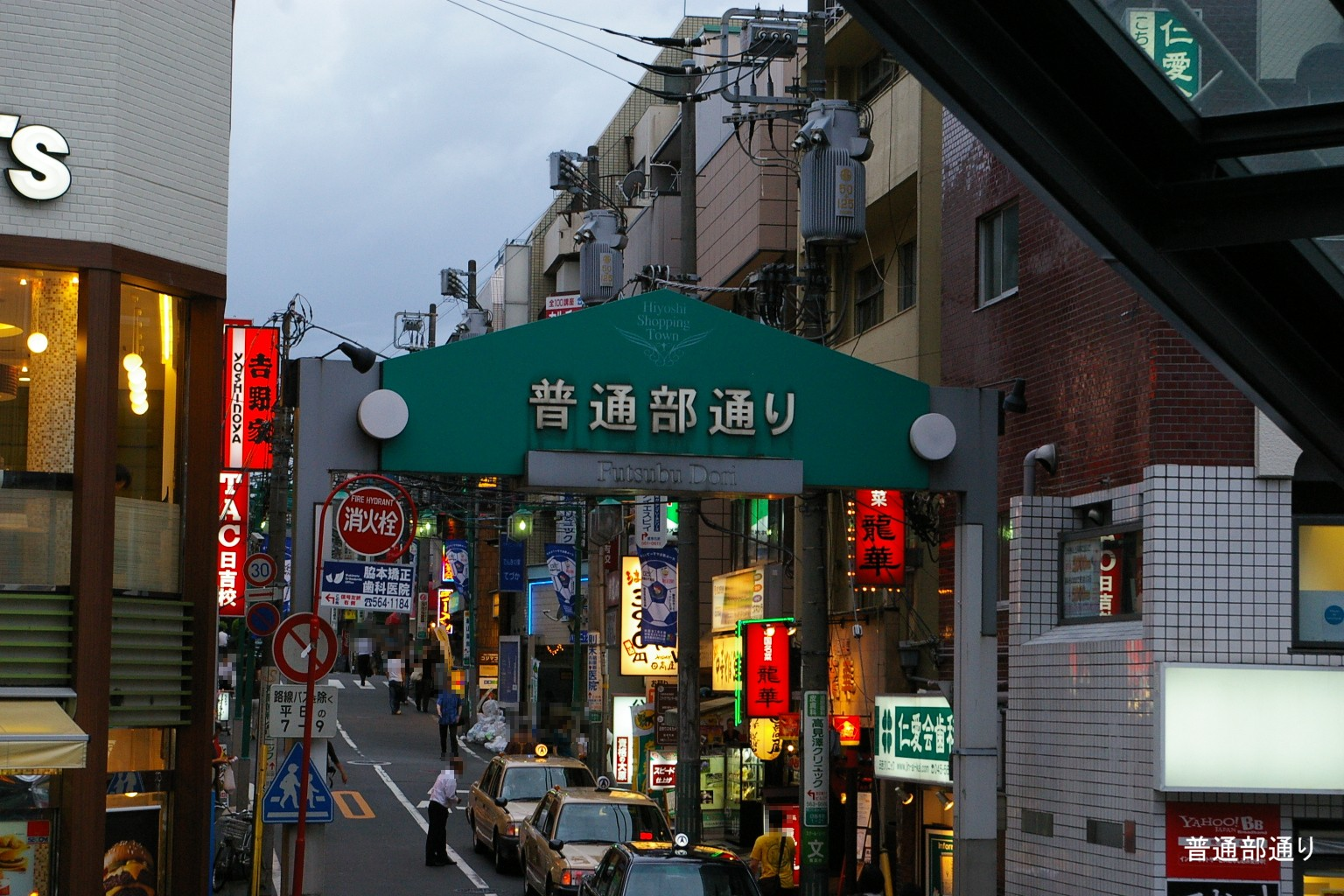 2009.5日本国内で塾生 (talk)が撮影。